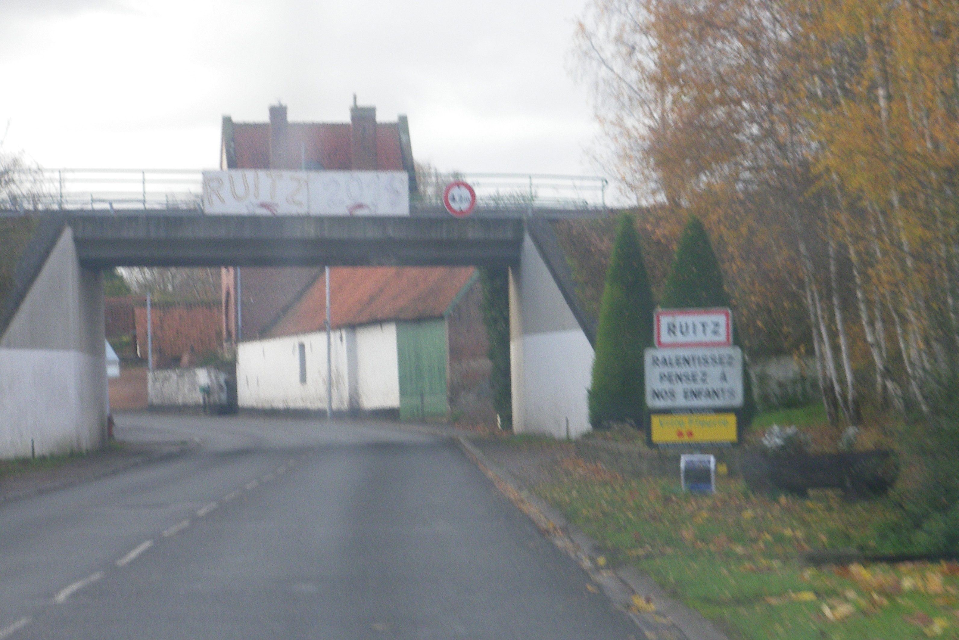 Panneau d'entrée de la commune de Ruitz.